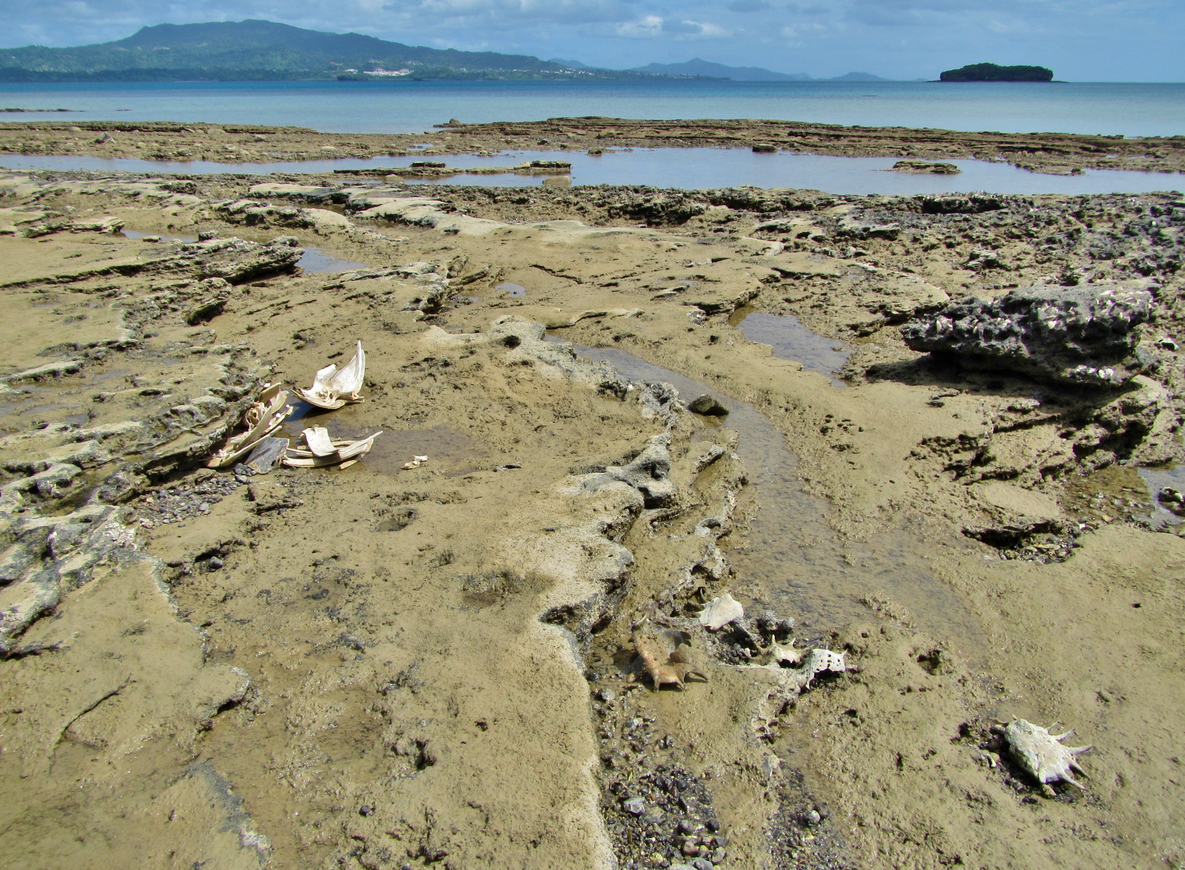 Restes d'une séance de braconnage à Petite-Terre, à Mayotte. On distingue une carcasse de tortue verte et des coquilles éclatées de strombes.